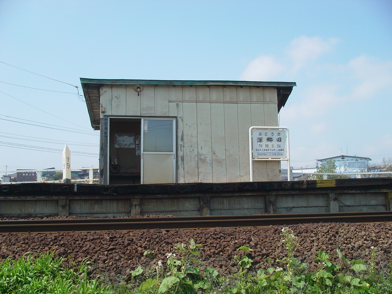 （津軽鉄道線深郷田駅）